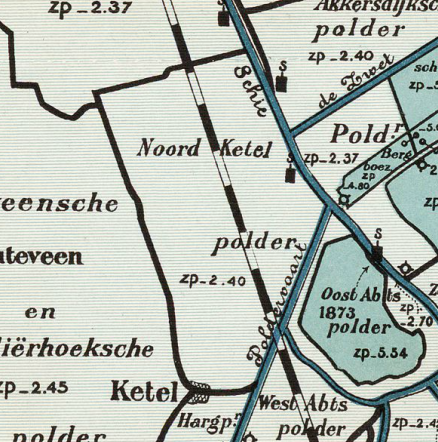 Noord Ketel polder